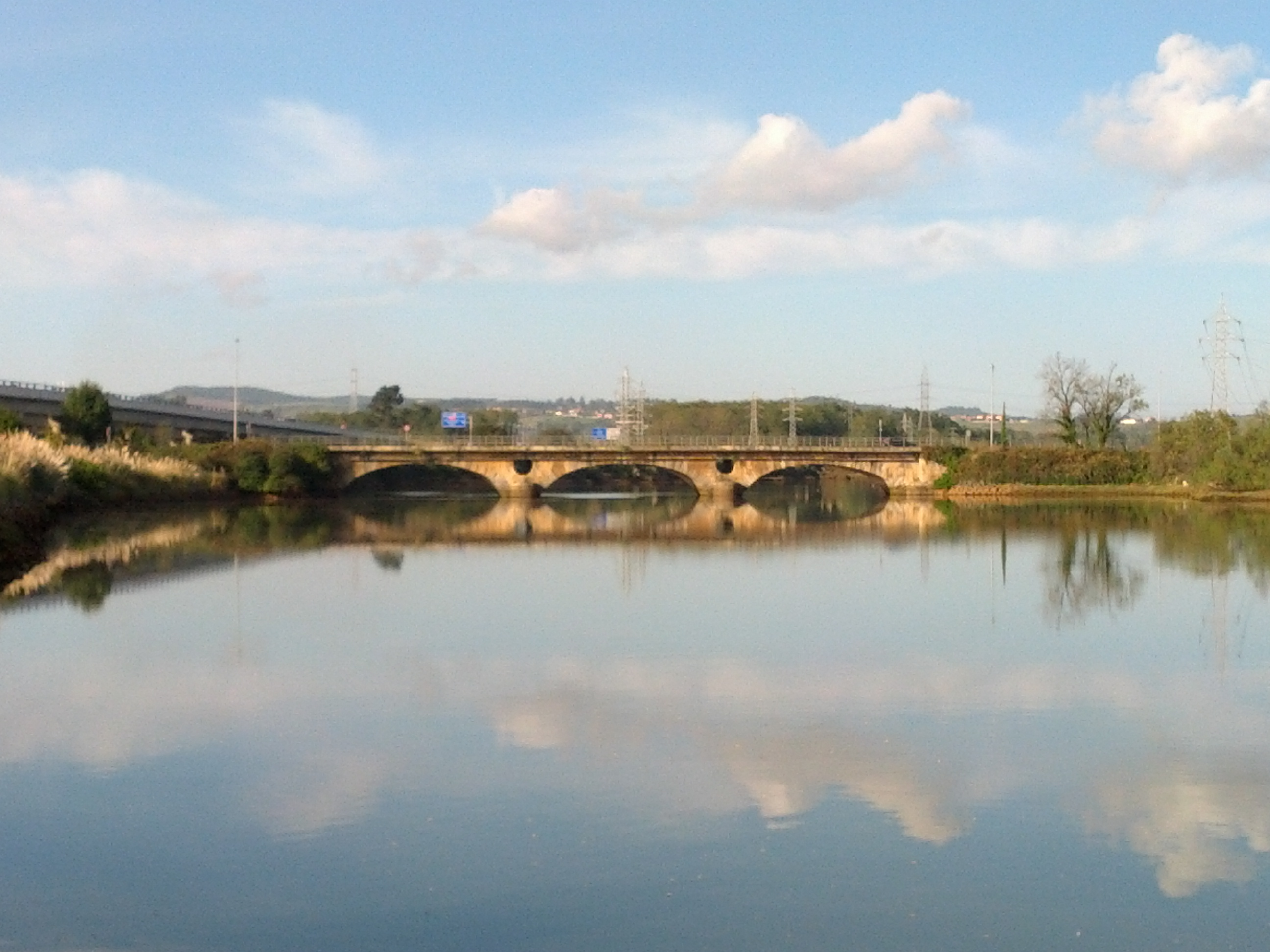 Puente de San Salvador, sobre la ría de Solía, en Cantabria (España)